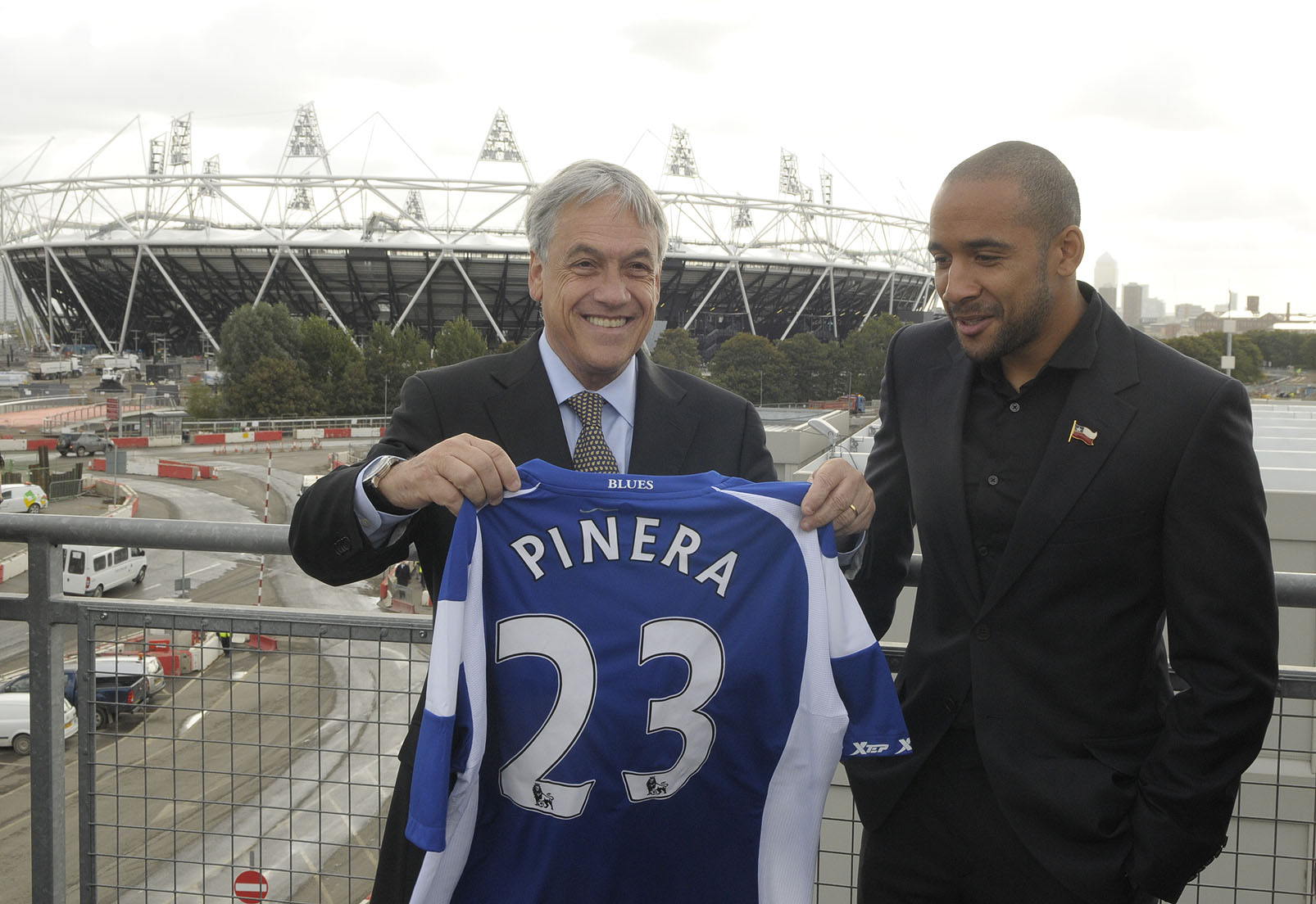 El Presidente de Chile Sebastián Piñera junto al futbolista chileno Jean Beausejour, en la Visita al Parque Olímpico de Londres.